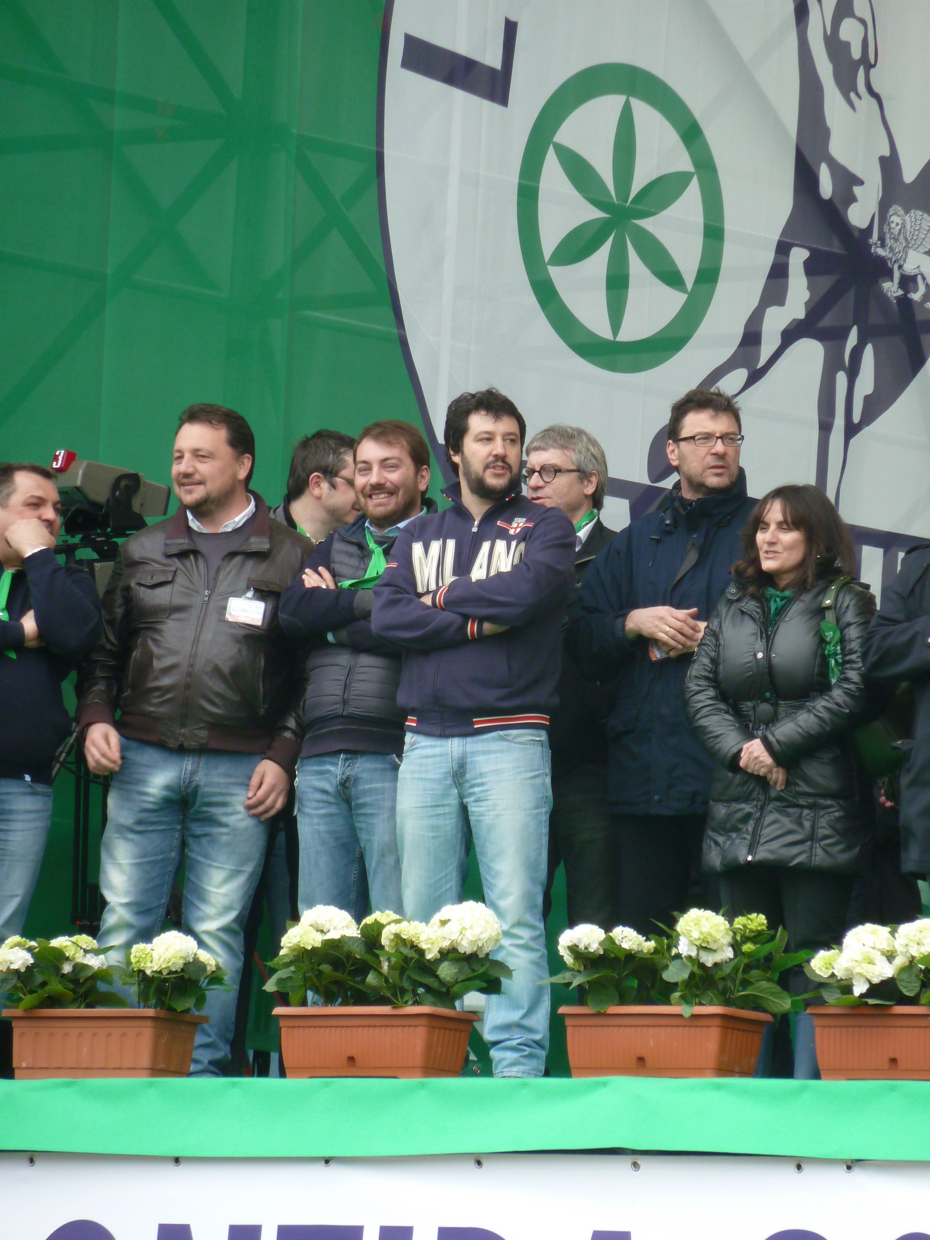 Foto dal raduno della Lega Nord a Pontida ad aprile 2013.